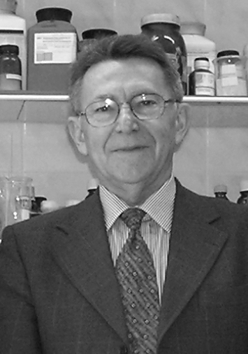 Profesor Bogumił K. Brzezinski, polski chemik organik